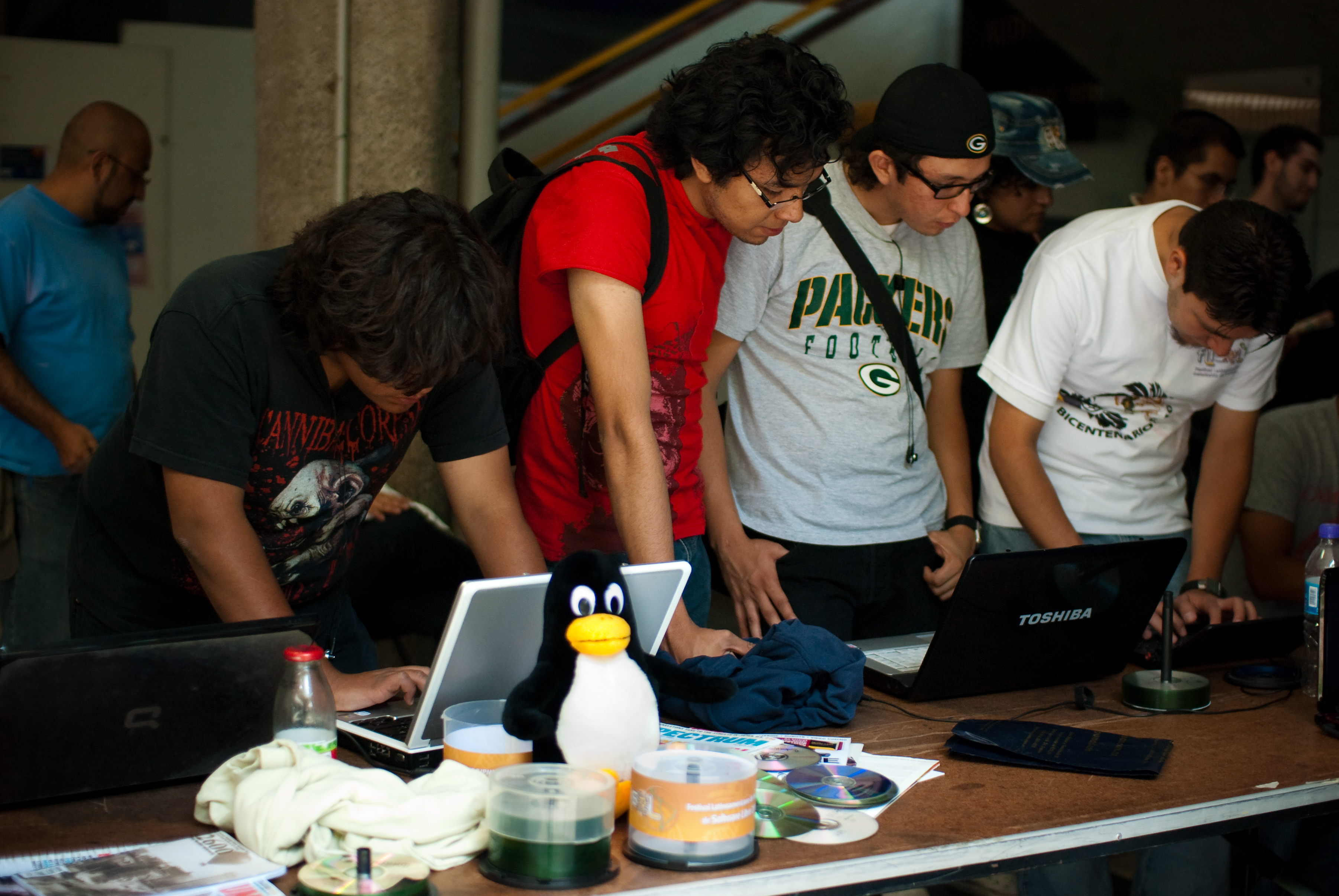 En vivo. Los usuarios que desean probar el Software Libre siguen llegando a la Facultad de Ingenieria para el Festival Latinoamericano de Instalación de Software Libre. Al mismo tiempo hay conferencias, ahorita hay una sobre Hacking Ético y Software Libre.